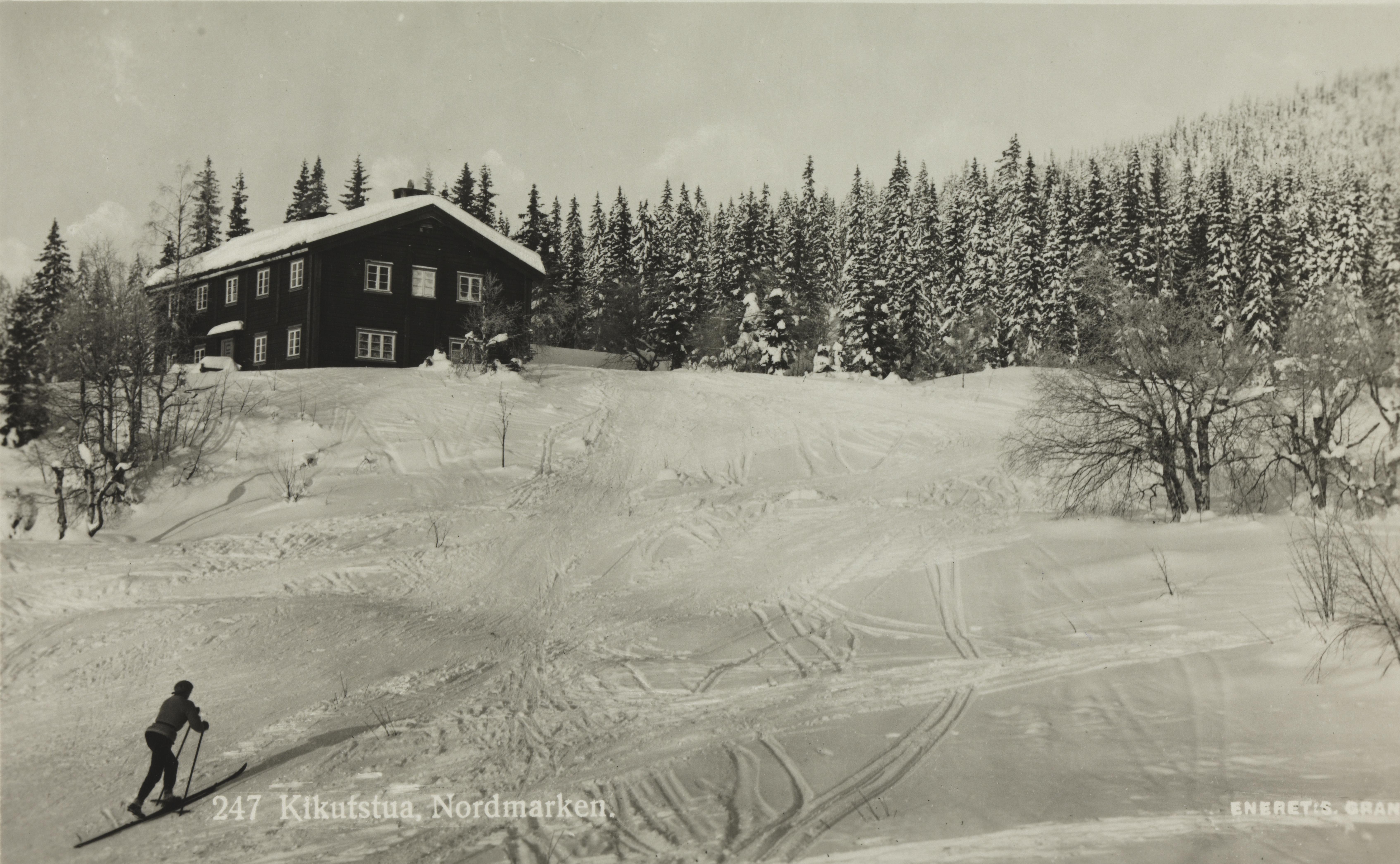 Bildet er hentet fra Nasjonalbibliotekets bildesamling Kikutstua,Nordmarka, Oslo, Oslo